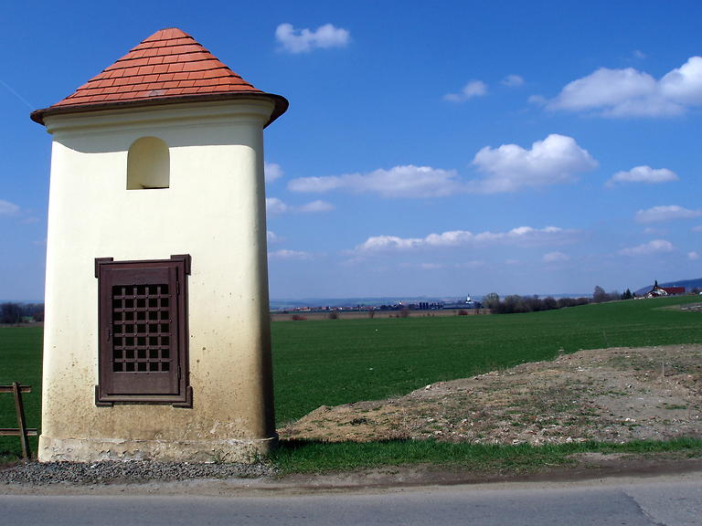 Výklenková kaplička sv. Anny (Držovice), u křižovatky Prostějov - Olomouc - Smržice - Vrahovice, Držovice